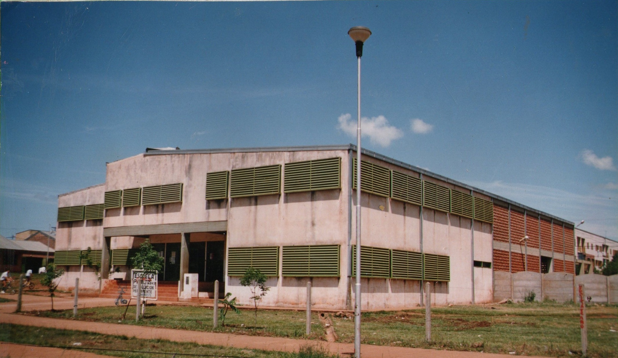 Fotografía del edificio de la primera secundaria de Villa Cabello